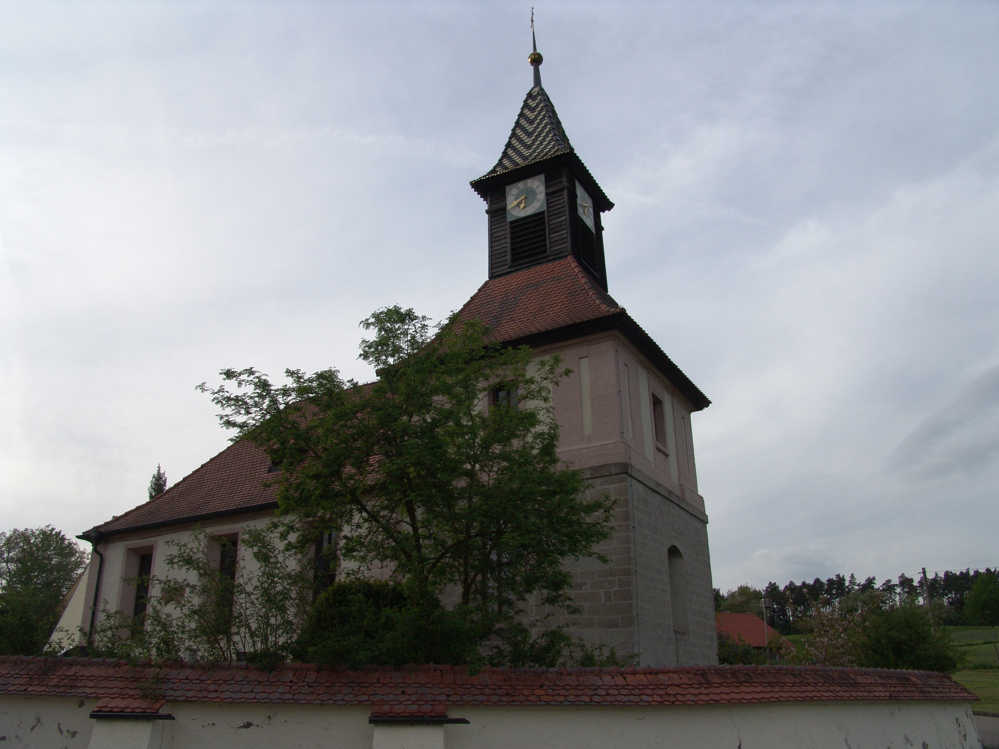 Evangelische Kirche